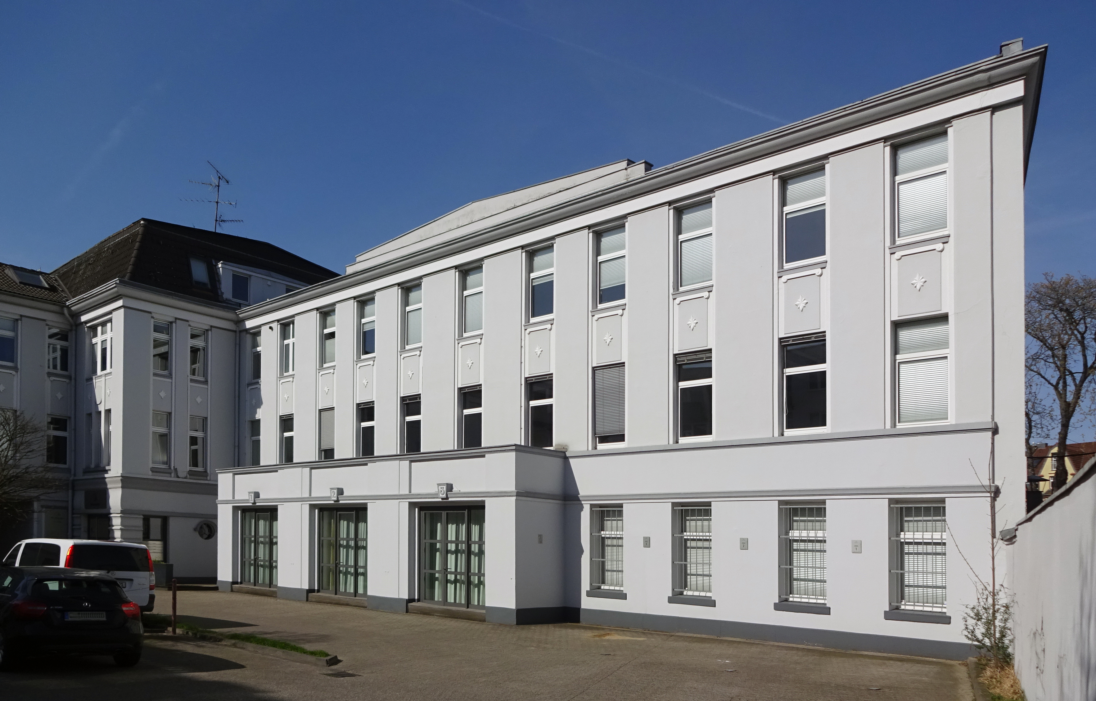 Schanzenstraße 20a, Düsseldorf-Oberkassel